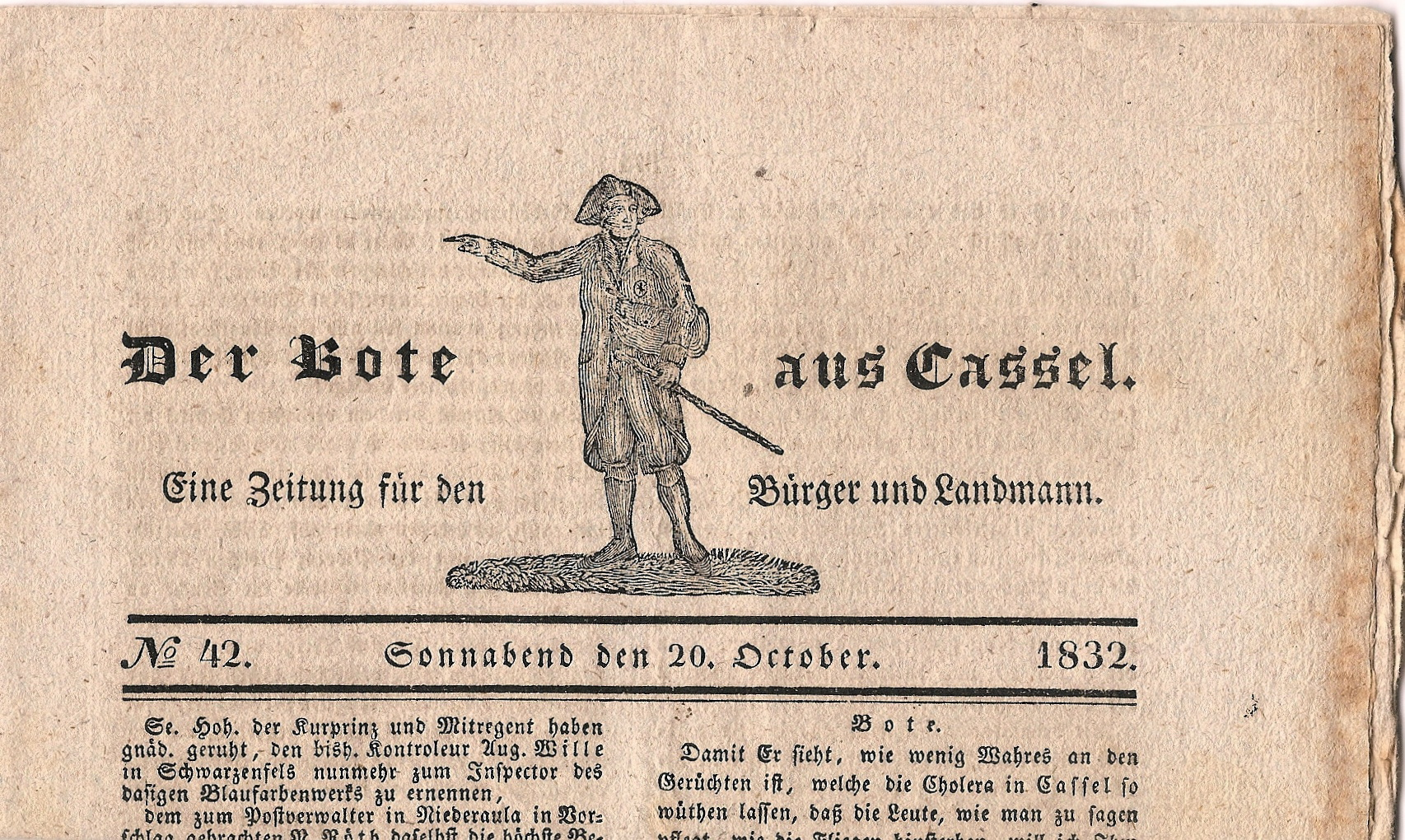 Ausgabe der Zeitschrift Der Bote aus Cassel vom 20. Oktober 1832